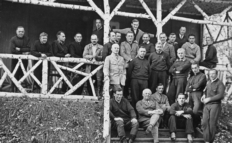 "Tomka"- Ein deutsches Geheimunternehmen hinter den Eisernen Vorhang in den Steppen des Wolgagebietes bei Molsk in den Jahren 1928-1931. Information added by Wikimedia users.